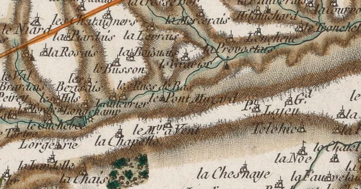 Mention de Pont-Muzard sur le plan de Cassini vers 1785 (Rennes, 129)